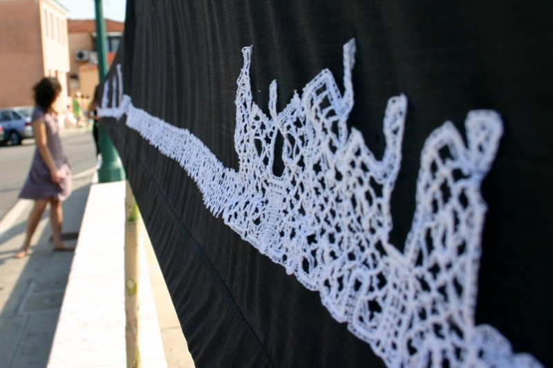 Strada Comunale della Laguna - Il Merletto